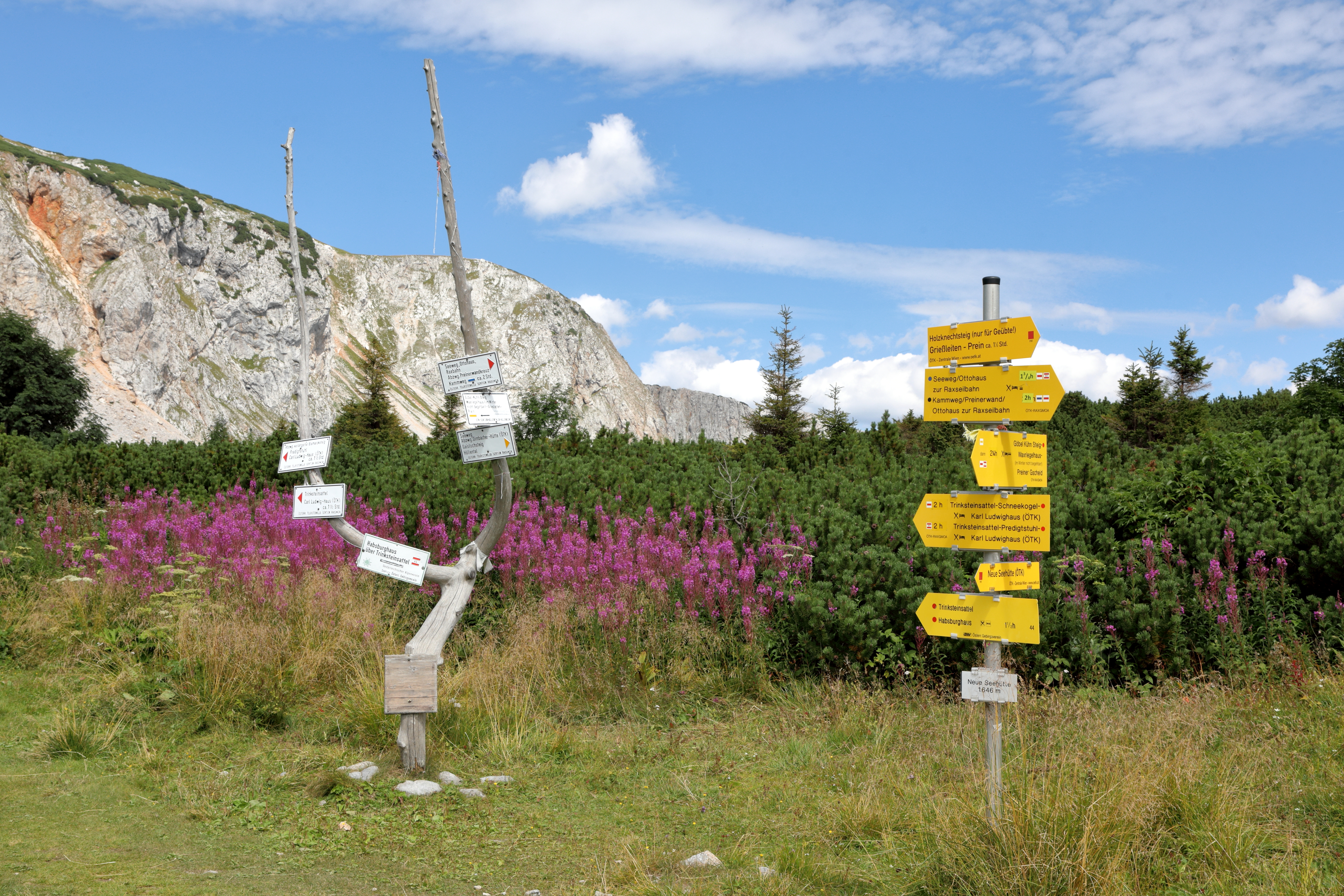 Wegbeschilderung auf der Rax nächst der Seehütte und auf dem Gebiet der niederösterreichischen Marktgemeinde Reichenau an der Rax.Links alte Beschilderungen und rechts die neuen, die vom Alpenverein standardisiert wurden, um im Ostalpenraum wieder eine einheitliche Beschilderung zu erreichen.